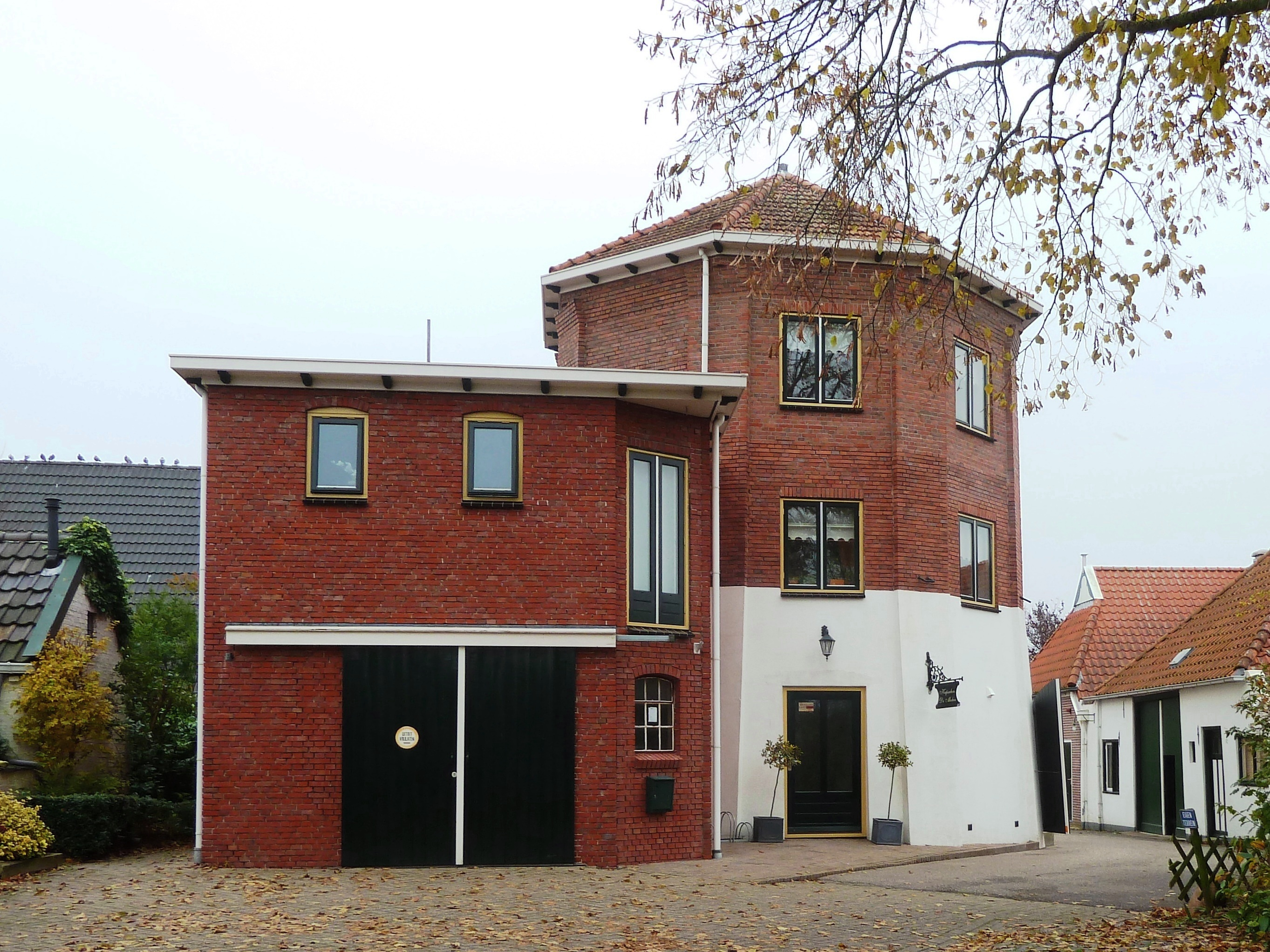 Voormalige molen (1840-1934; afgebrand) aan de Molenreed in Kommerzijl.